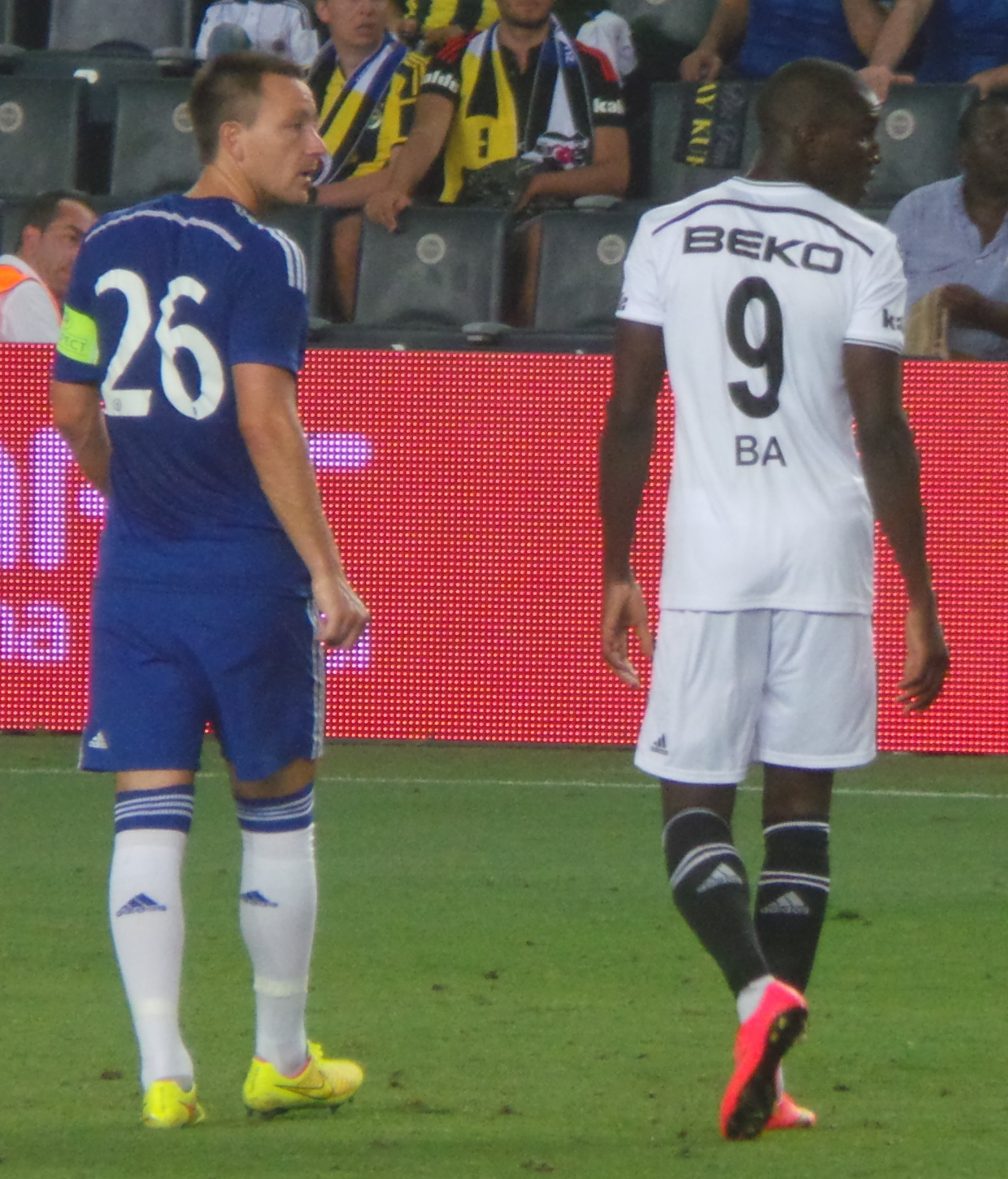 Demba Ba ve eski takım arkadaşı John Terry soma adına düzenlenen turnuvada